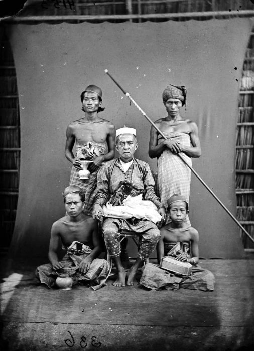 Repronegatief. Regent van Maros met gevolg, Makassar, Celebes